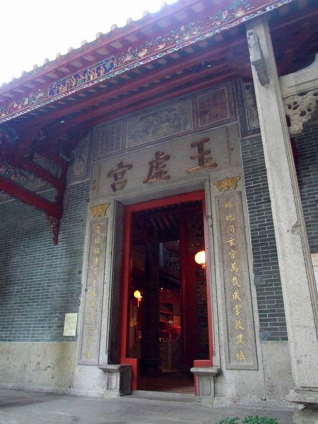 灣仔北帝廟主殿